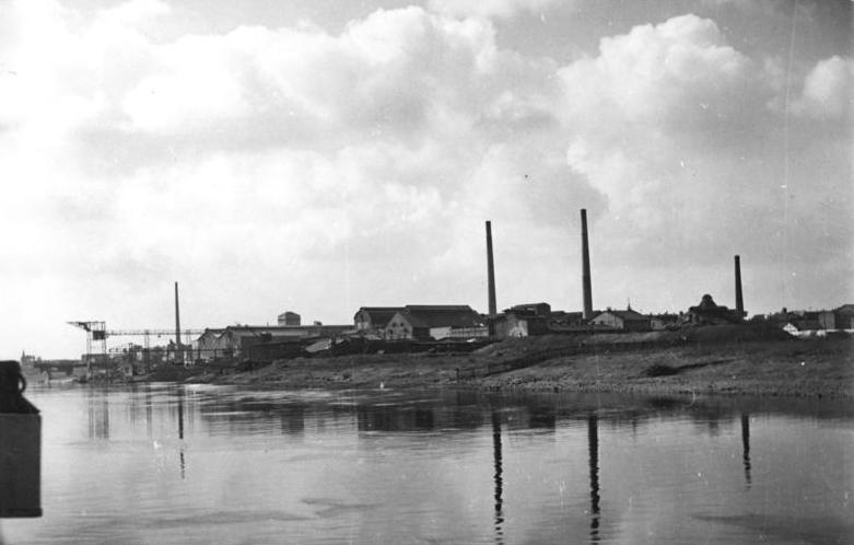 Magdeburg, VEB Fahlberg-List Zentralbild Rösener 10.9.1953 Volkseigener Betrieb FAHLBERG - LIST in Magdeburg.